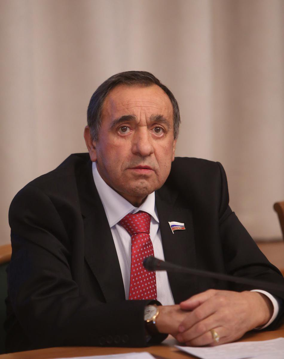 Василий Тарасюк на круглом столе Комитета Государственной Думы по энергетике на тему «Импортозамещение нефтегазового оборудования как основа экономической и энергетической безопасности» 30 ноября 2015 года.